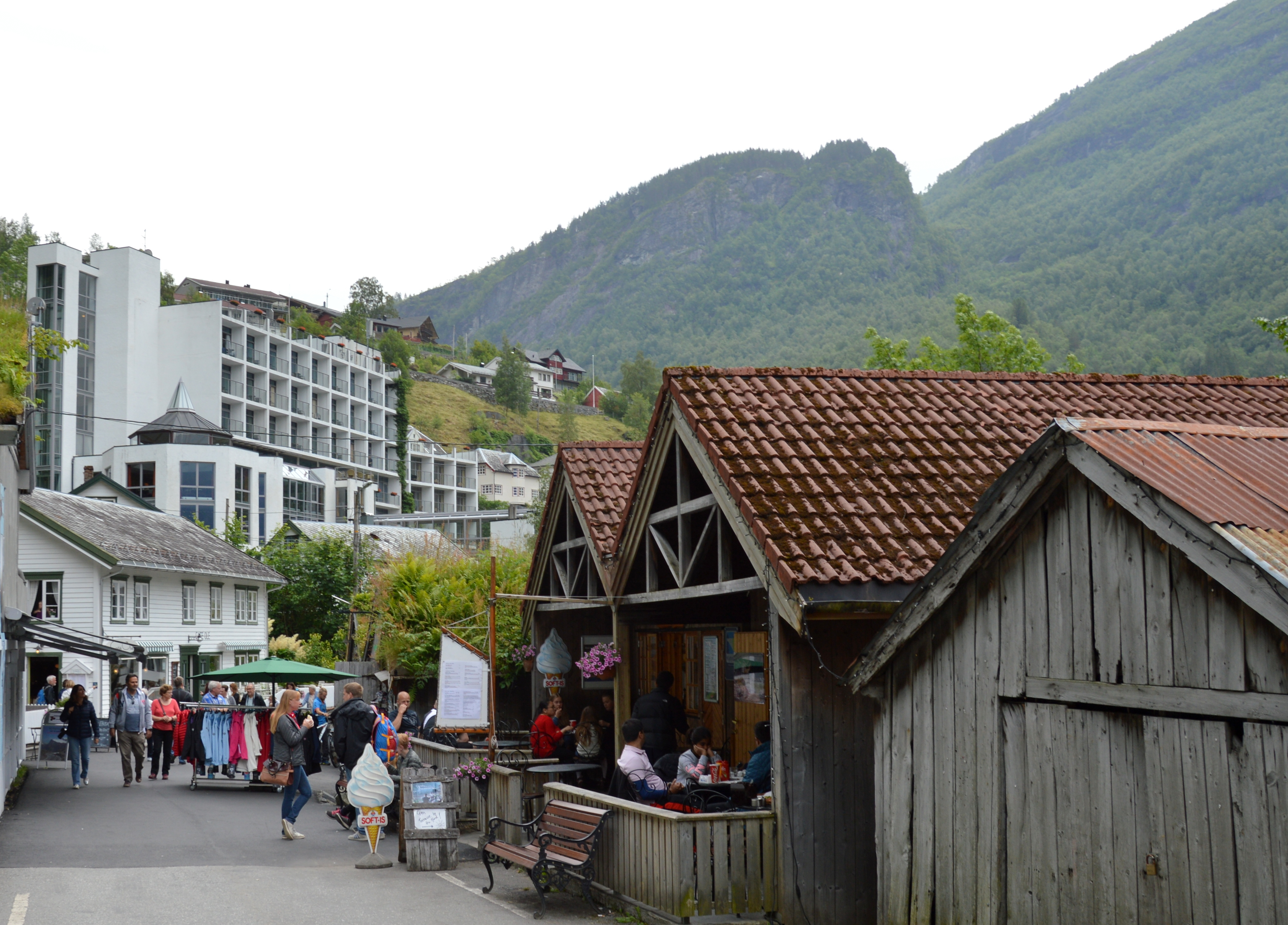 Straße durch Geiranger